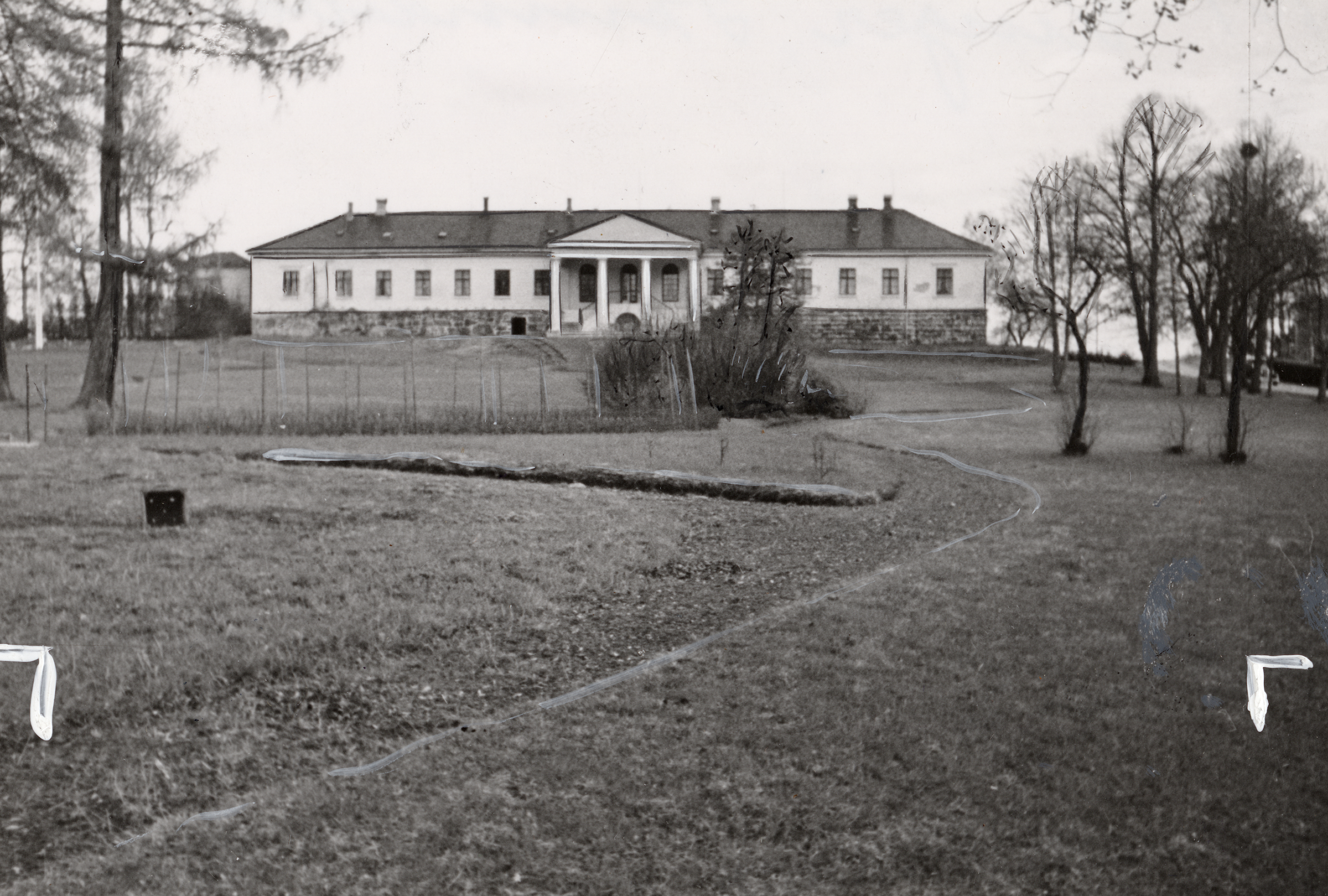 Skinnarbøl i Vinger, Hedmark